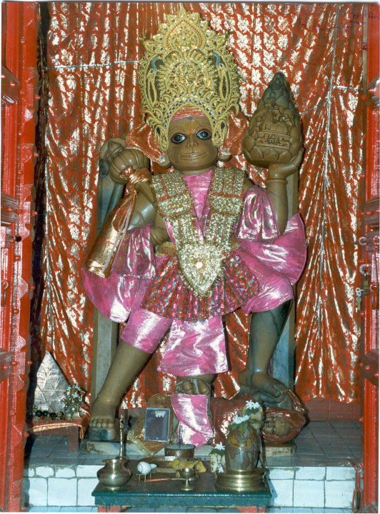 पुरानी छावनी , धौलपुर स्थित , श्री हनुमान का प्राचीन मन्दिर, सुडौल प्रतिमा में शिराऐं साफ नजर आती हैं। स्थपित- लगभग ई०सन्ः 1700.